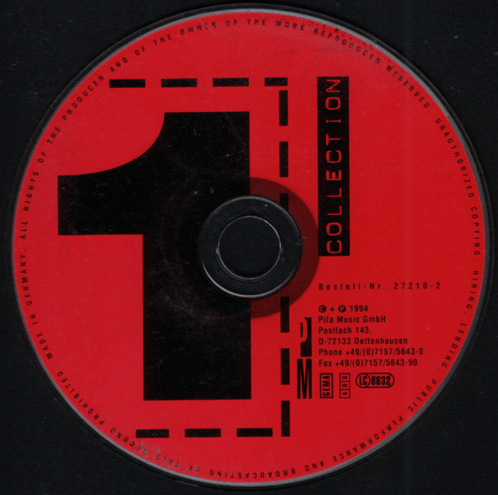 Scanfoto der ersten CD aus der „Pila-Collection“